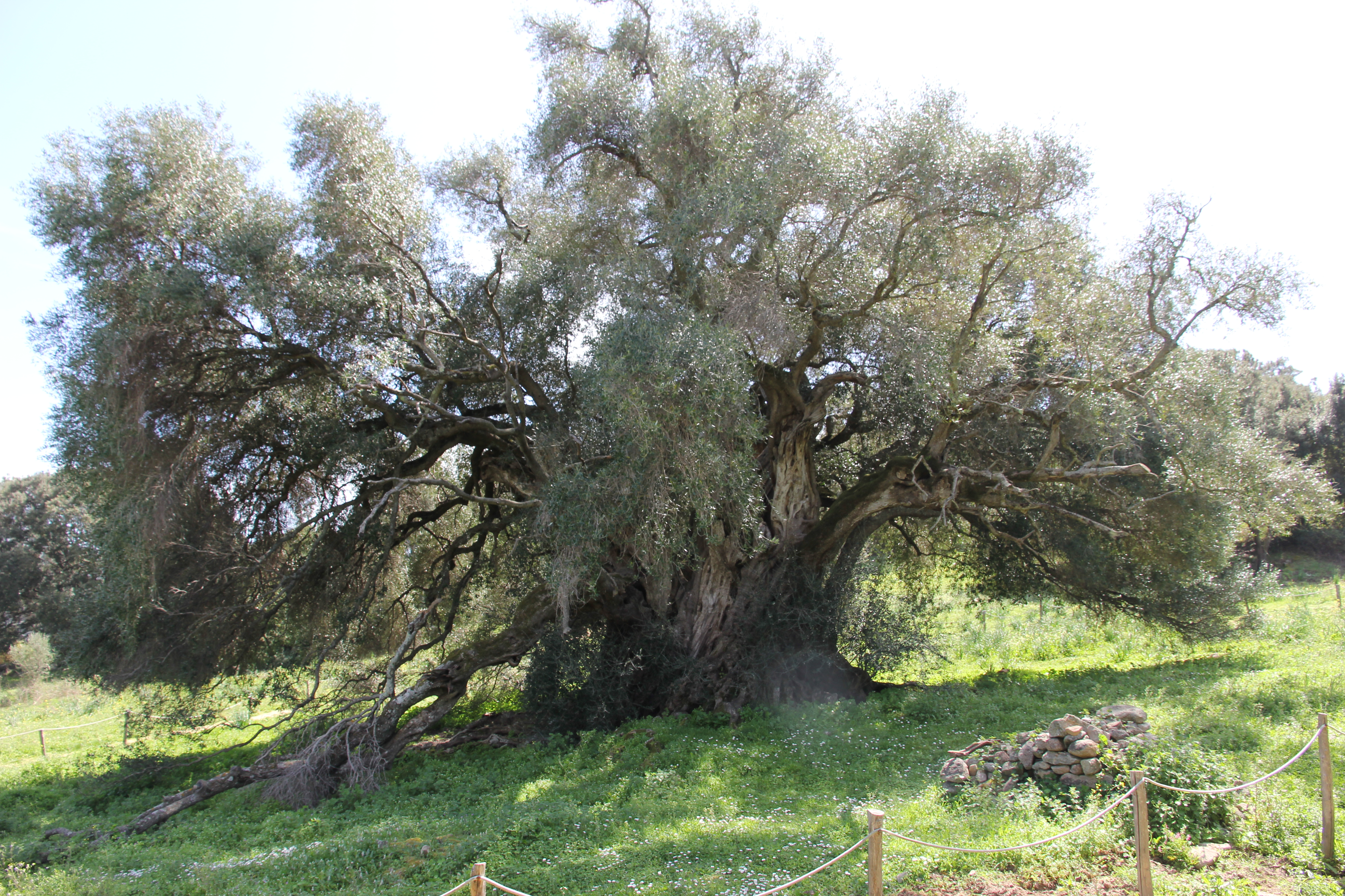 Luras - Olivastri millenari